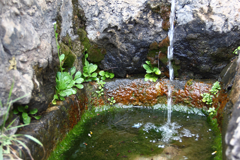 Fuente de la Cañarroa cerca del desaparecido pueblo de Benínar (Almería)